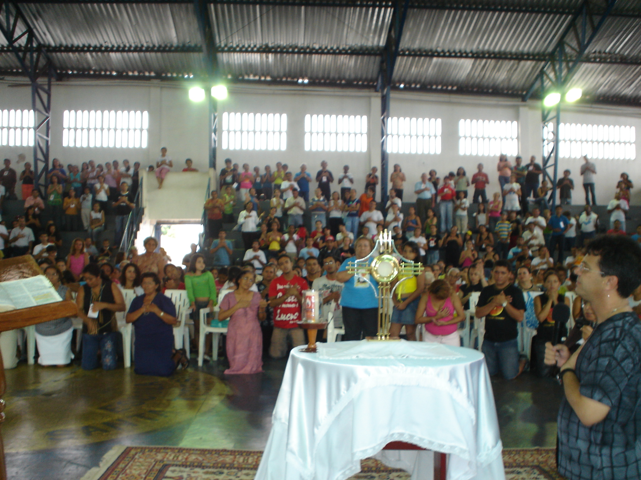 Renovação carismática católica, Roberto Tannus ministrando Congresso da RCC em Imperatriz-Ma em 2005. Foto tirada por mim: Clóvis Jr